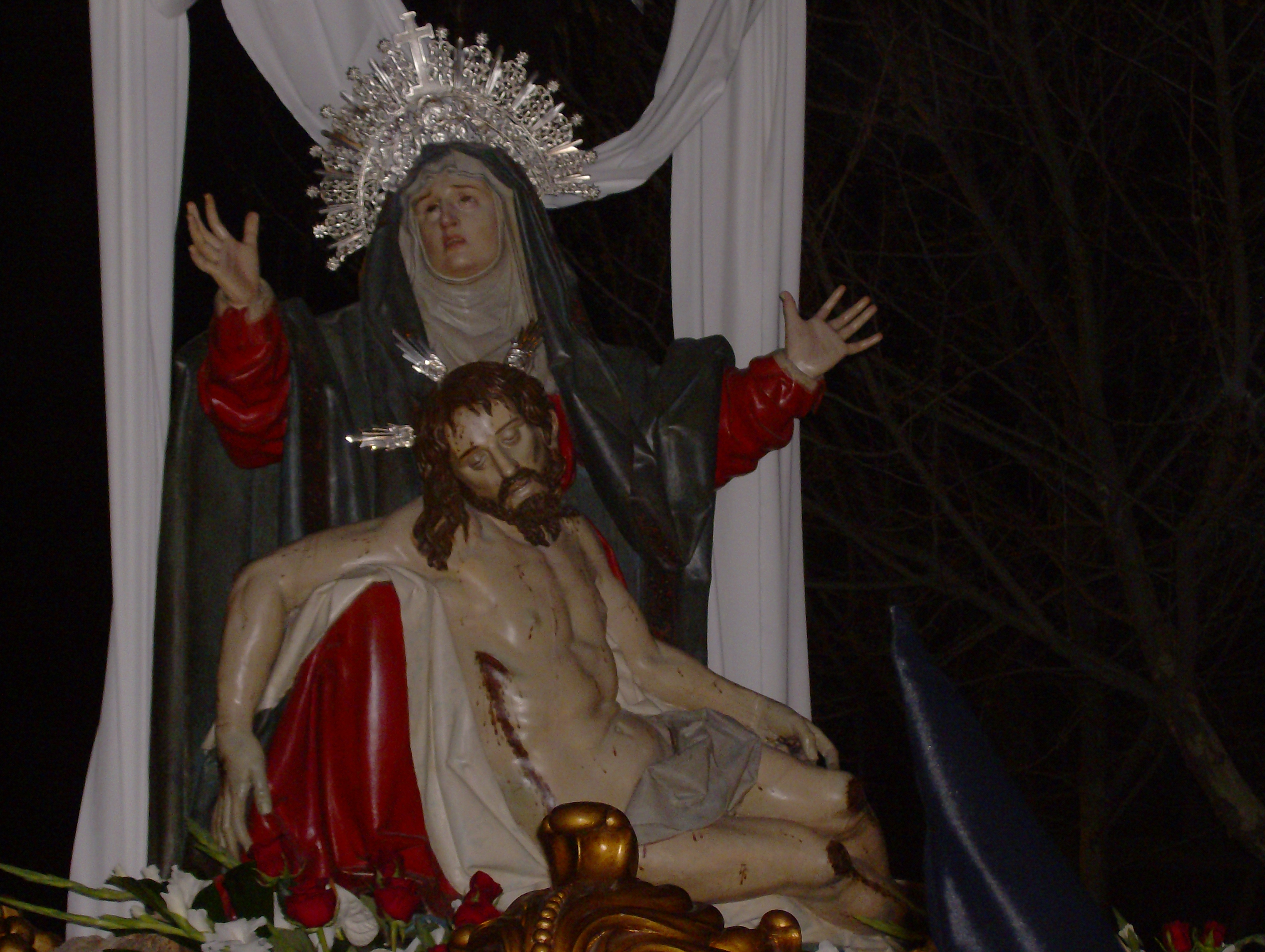 'La Quinta Angustia', obra de Gregorio Fernández. La talla procesiona en la Semana Santa de Valladolid y es titular de la Cofradía de Nuestra Señora de la Piedad. Perteneciente a la parroquia de San Martín de Valladolid, se halla temporalmente alojada en el Convento de las Descalzas Reales COFRADÍA PENITENCIAL DE NUESTRA SEÑORA DE LA PIEDAD: Sede canónica: Iglesia Parroquial de San Martín. Localidad: Valladolid. País: España. Fundación: 22 de Agosto de 1578. Pasos-Tronos: 2. Alcalde-Hermano Mayor: Santiago Temprano Pin. PROCESIONES-HORAS: Miercóles Santo (24,00h) P. de la Piedad. Jueves Santo (19,30h) P. de Penitencia y Caridad. Viernes Santo (aprox.21,30h) P.General de la Sagrada Pasión del Redentor.